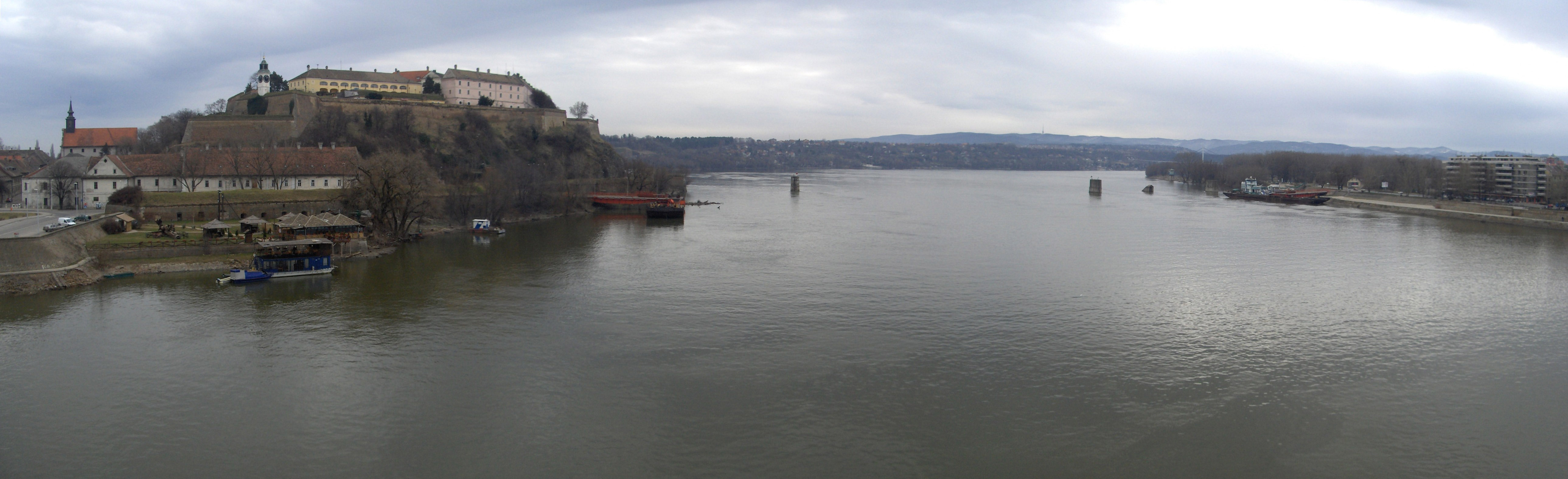 Danube in Novi Sad.